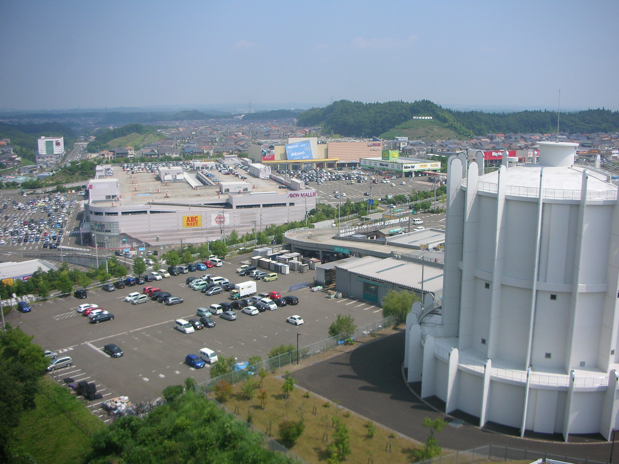 富谷第二配水池